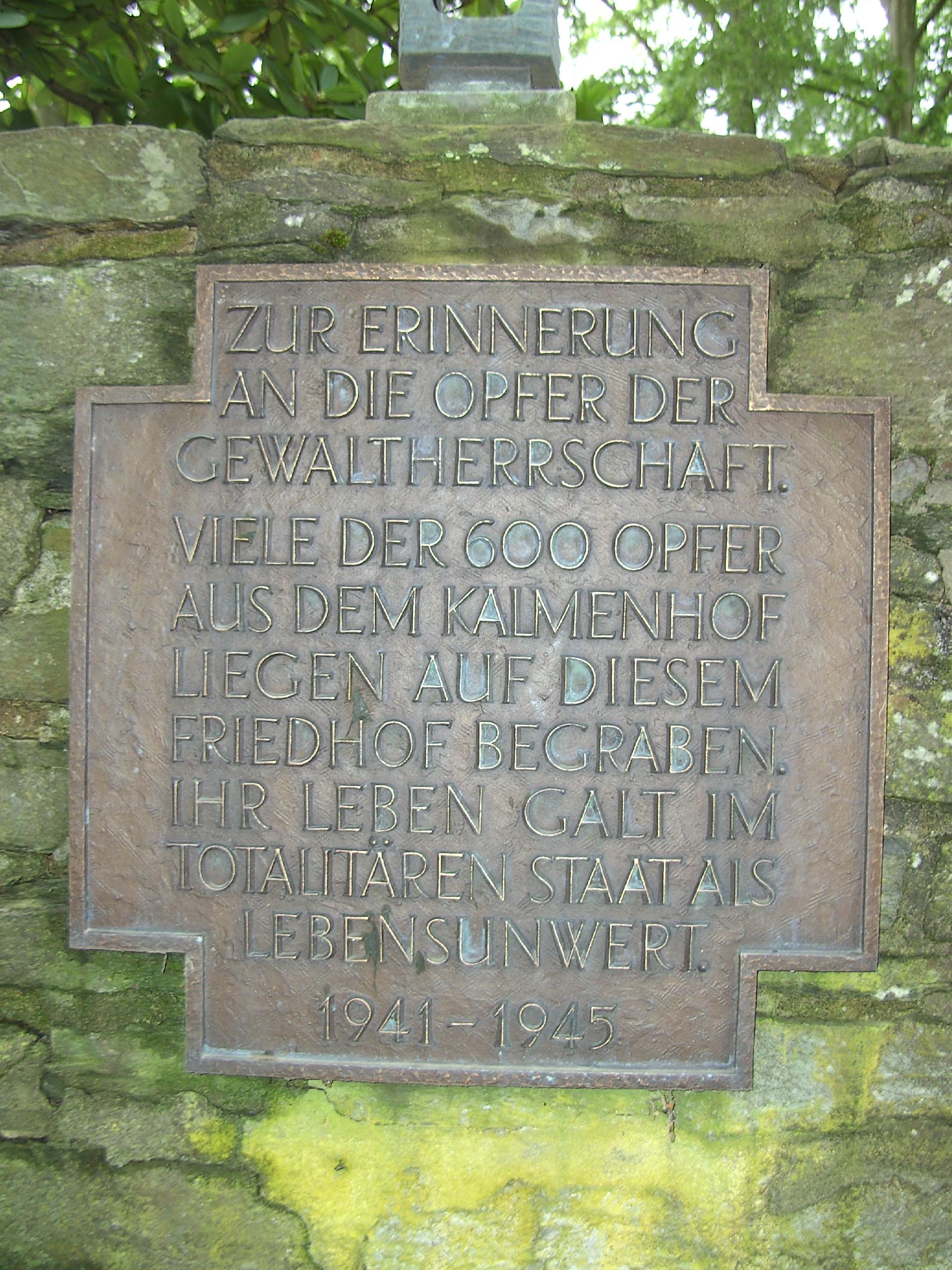 Gedenkplatte auf der Kriegsgräberstätte Idstein für die Kalmenhofopfer